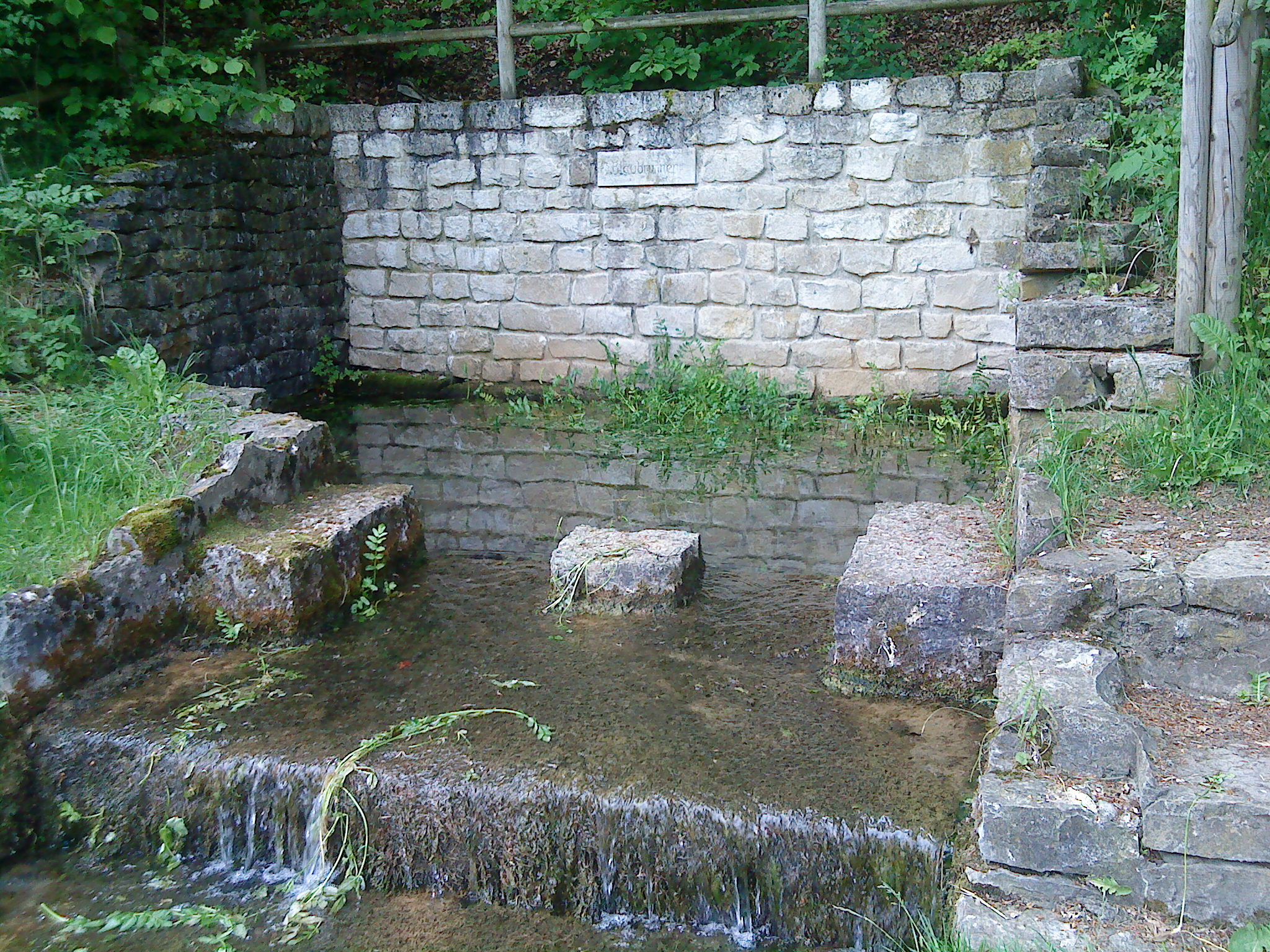 Der Blaubrunnen in Titting-Altdorf